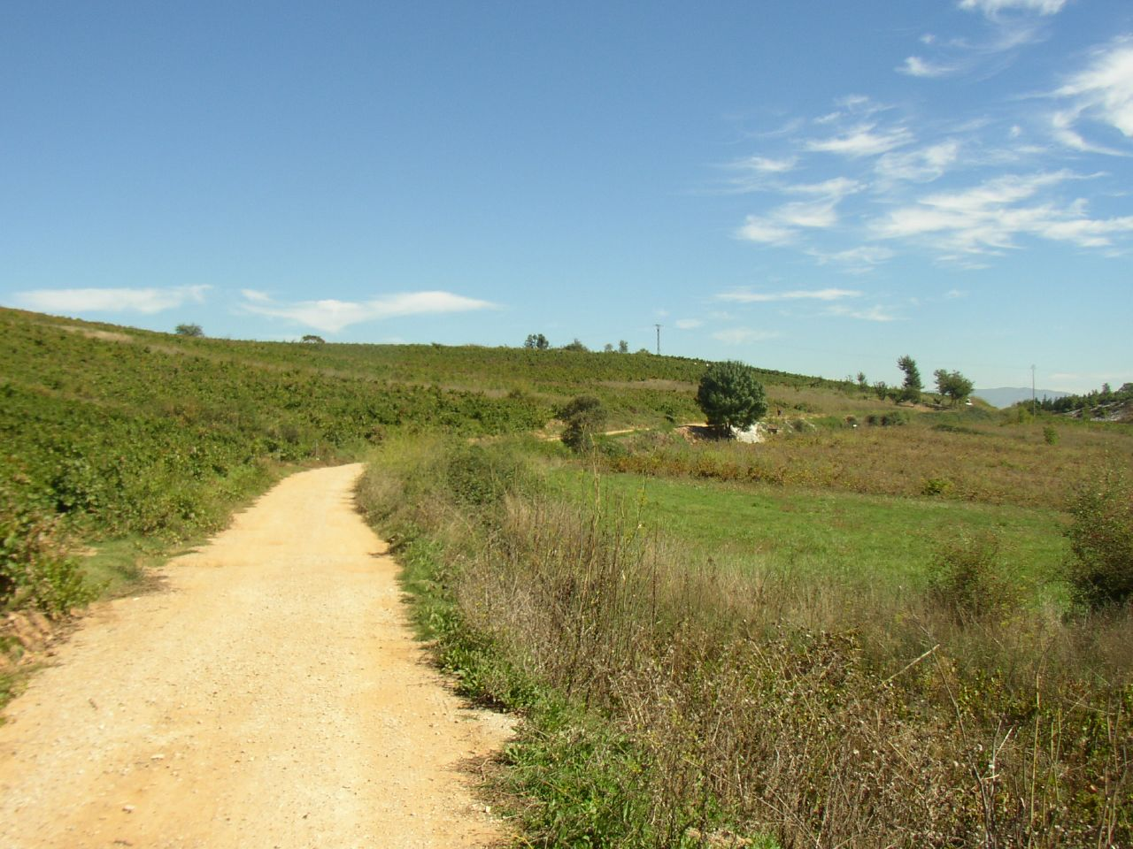 vineyards near Camponaraya (Volviendo la vista atrás y viendo la senda que acabas de cruzar.) Vuela hasta esta localización (Necesitas Google Earth)